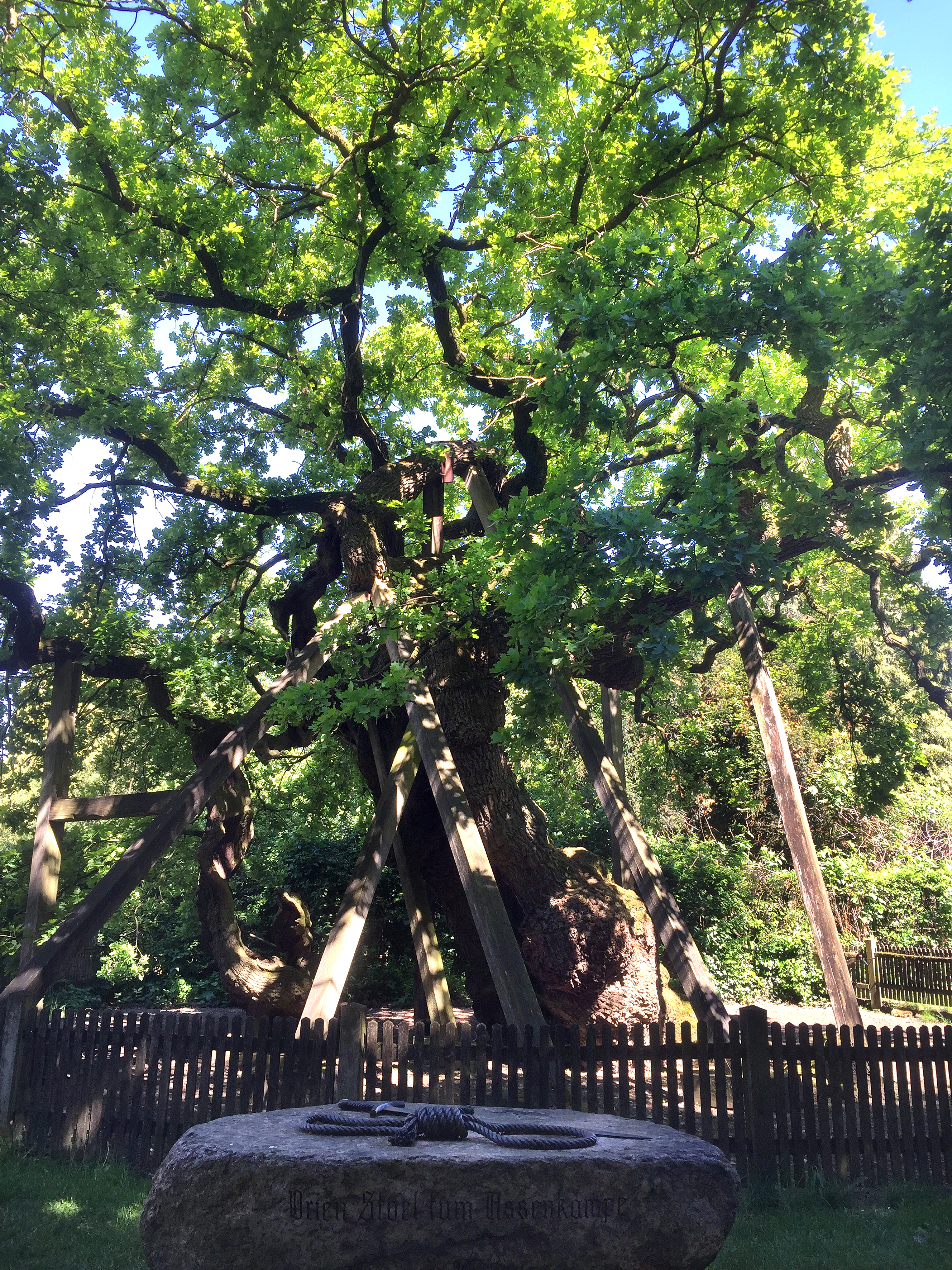 Naturdenkmal "Erler Femeiche". 1000-jähriger Eichenbaum in Erle, einem Ortsteil der Gemeinde Raesfeld im Münsterland. Die Gemeinde Raesfeld liegt im Naturpark "Hohe Mark".